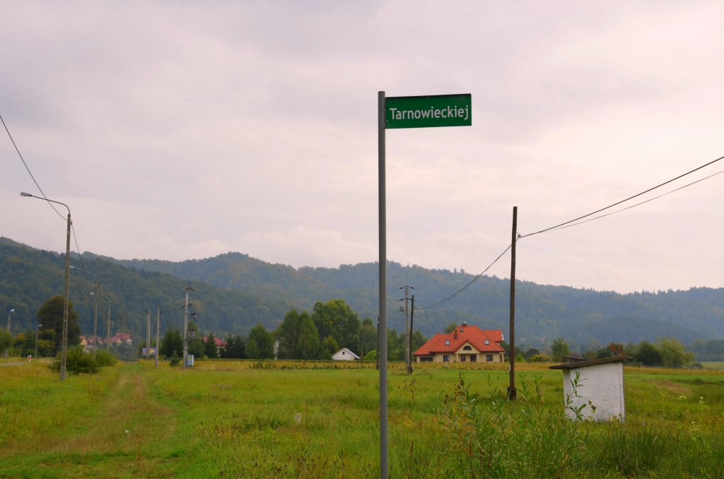 Tarnowieckiej-Straße in Bykowce